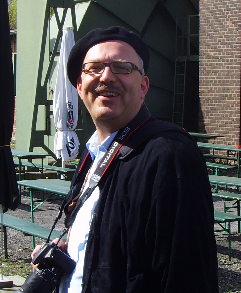 Bernd Gräfrath, deutscher Philosoph und Schachspieler